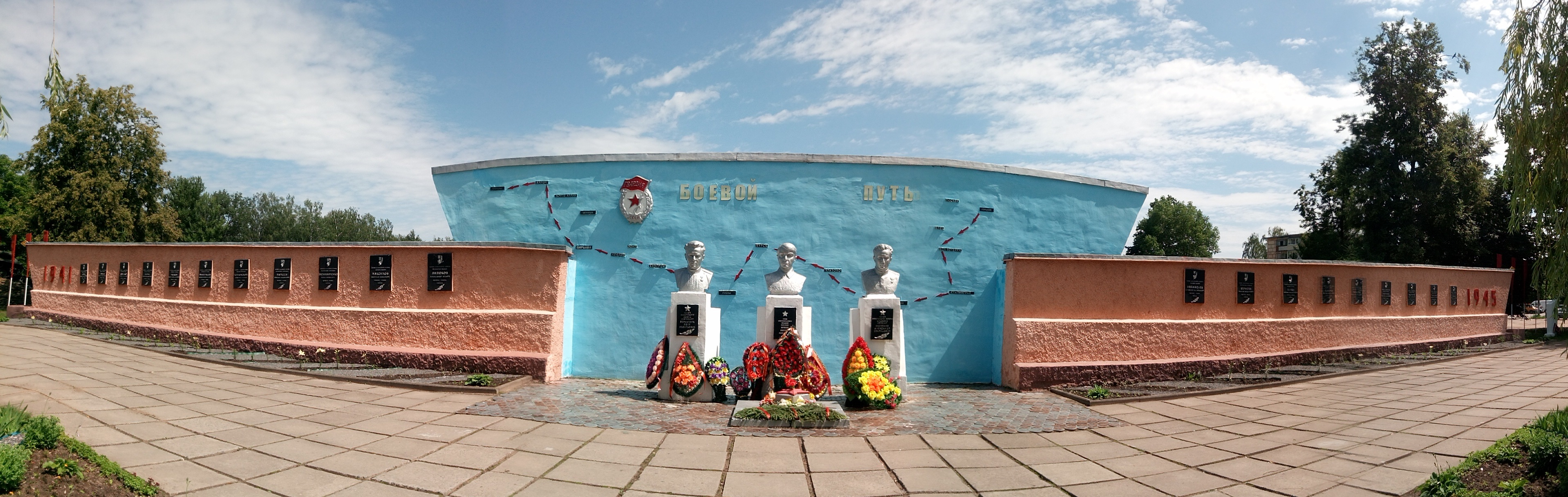 Мемарыял 8-ай танкавай дывізіі.